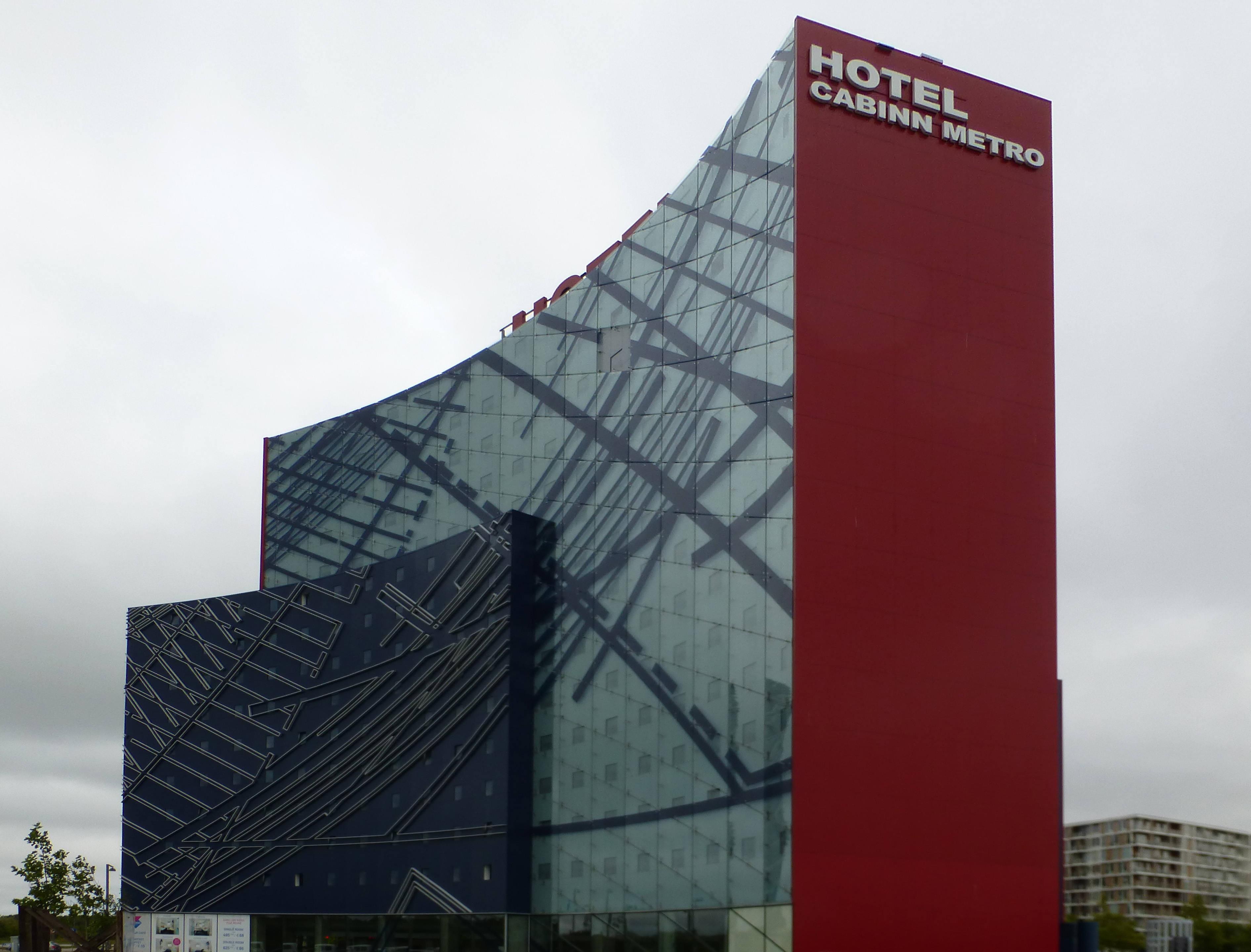 Hotel Cabinn Metro, Ørestad København